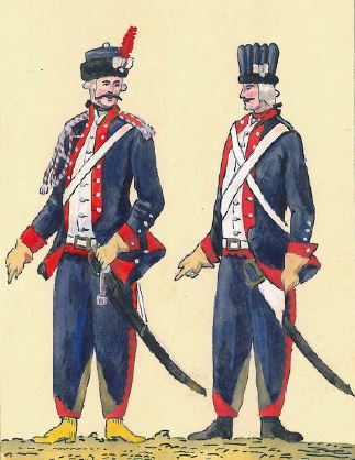 Towarzysz i szeregowy 2 Brygady Kawalerii Narodowej (Michała Zielonki)